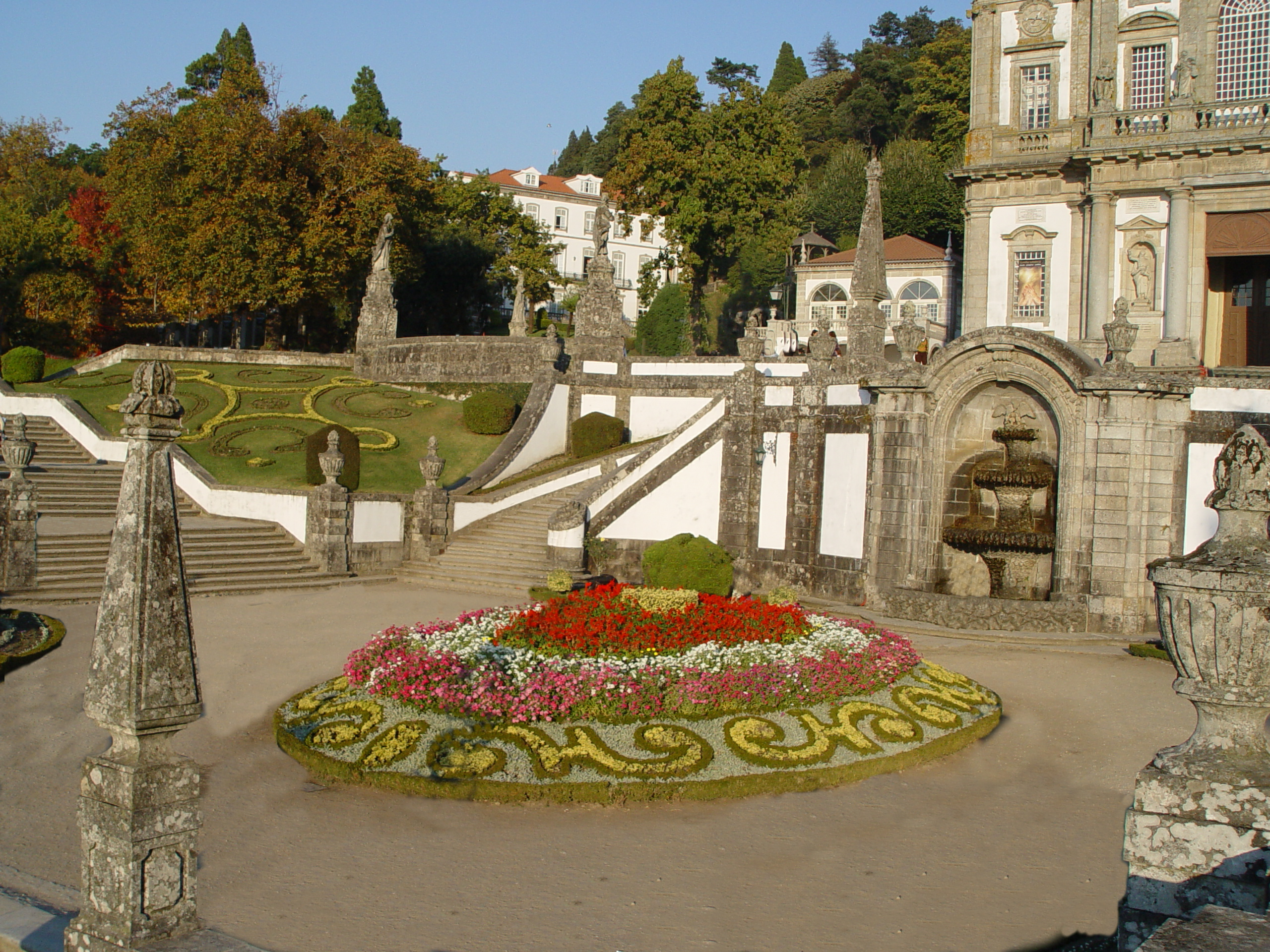 Terreiro de Moises in Bom Jesus, Braga, Portugal